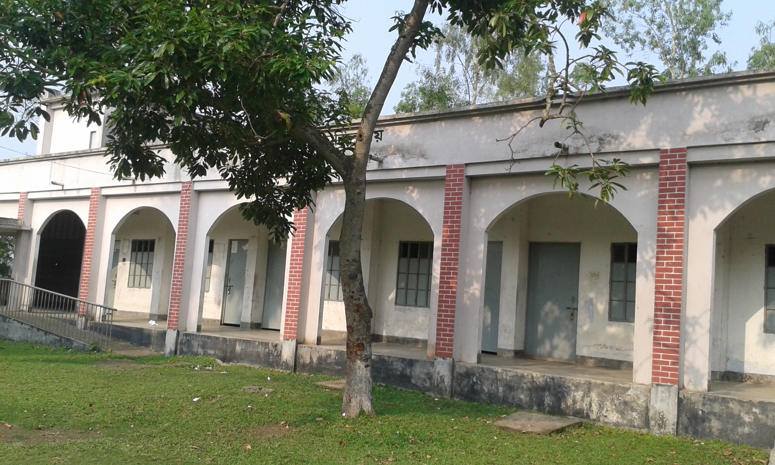 বিদ্যালয়ের নতুন একাডেমিক ভবন